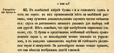 Параграф из книги Я.Грота "Русское правописание", посвященные "яти"